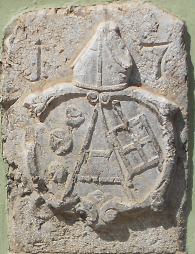 Grenzstein der ehem. Gemeinde Wilten und Innsbruck am Gasthof Krone (Ausschnitt mit dem Wappen des Stiftes Wilten)